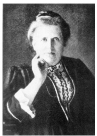 Constance Wachtmeister (1838-1910)